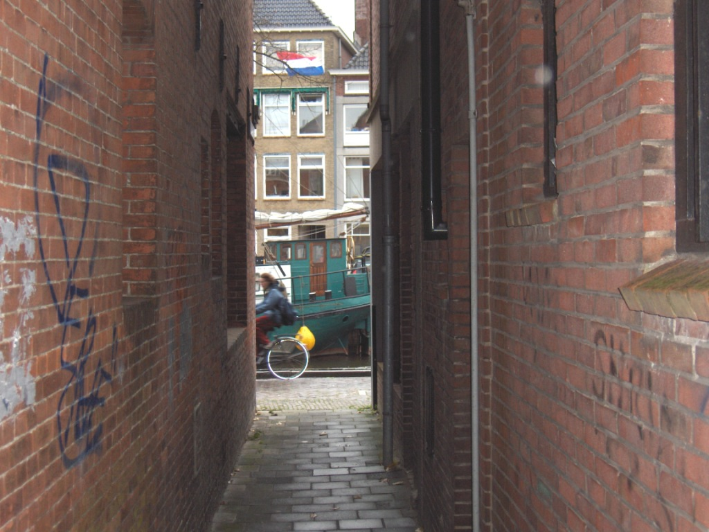 Mangelgang (steeg) in Groningen